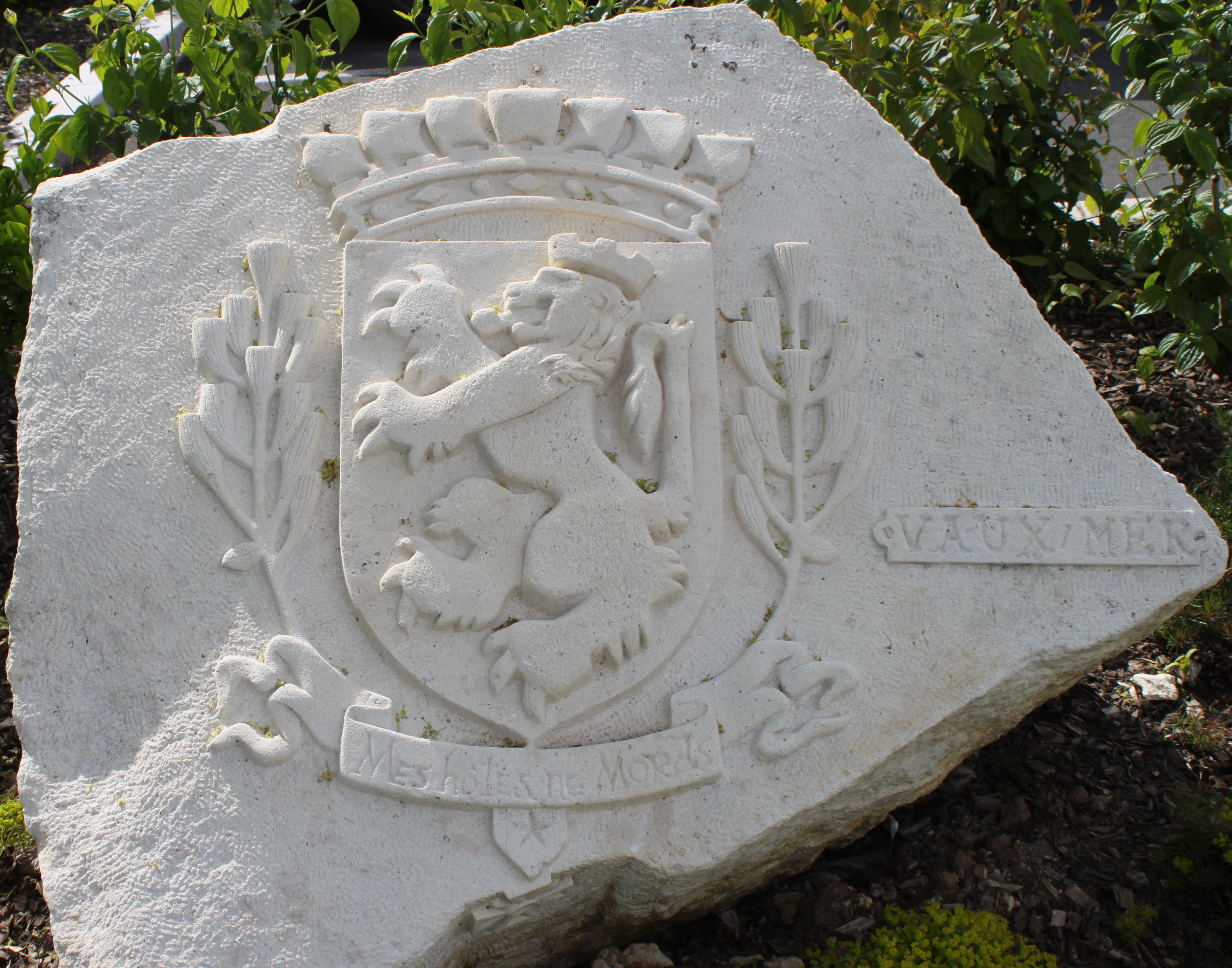 Blason de la commune, Fr-17-Vaux-sur-Mer.